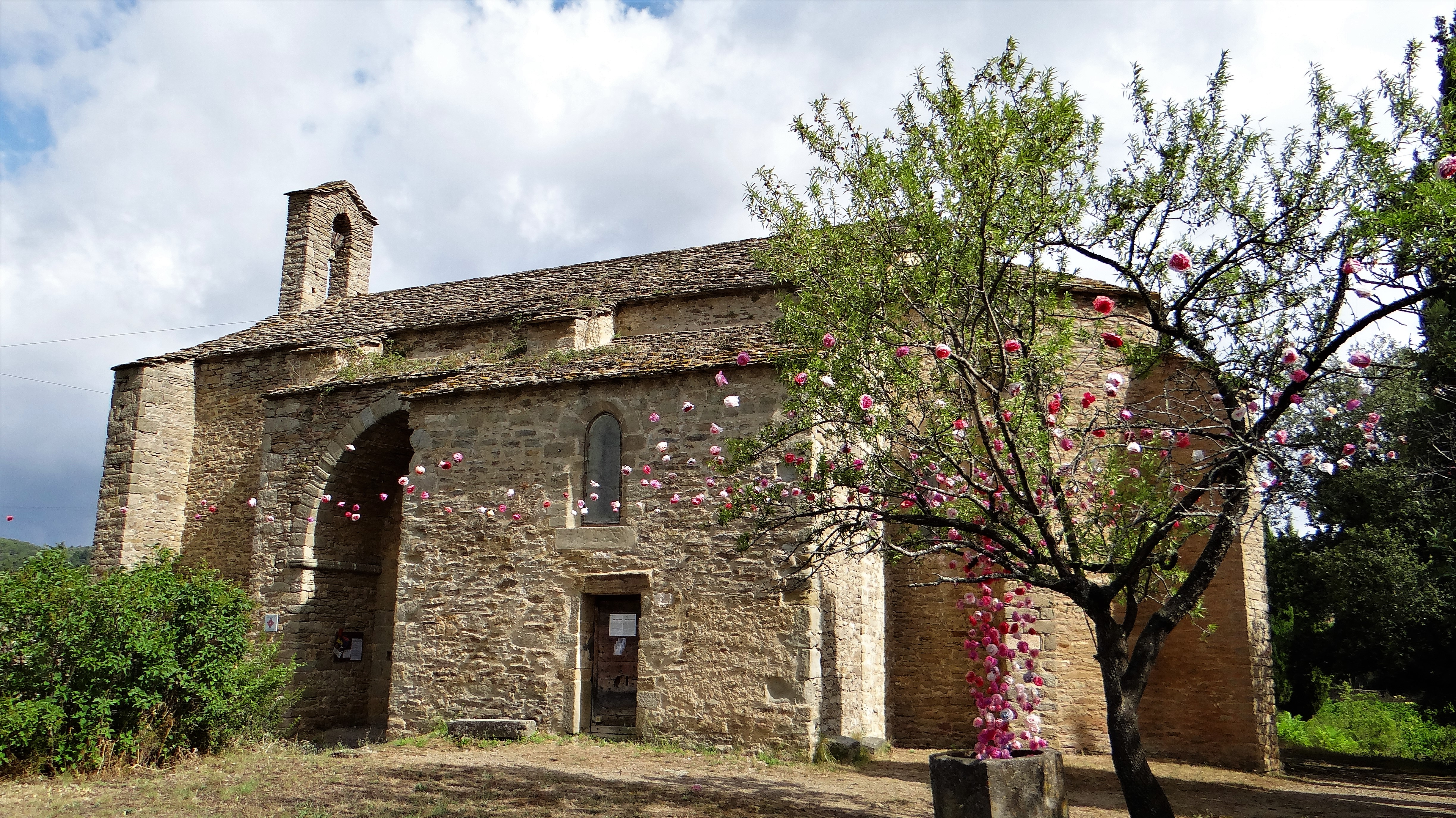 Siran - Chapelle Notre-Dame de Centeilles - Côté sud